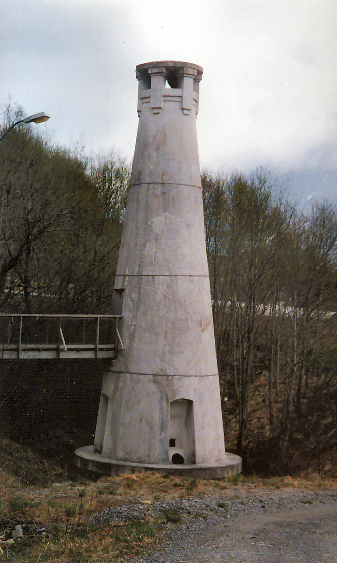 Heinrich Schmidt (1867-1947). Kalkovn på Blindheim i Sykkylven, Møre og Romsdal.